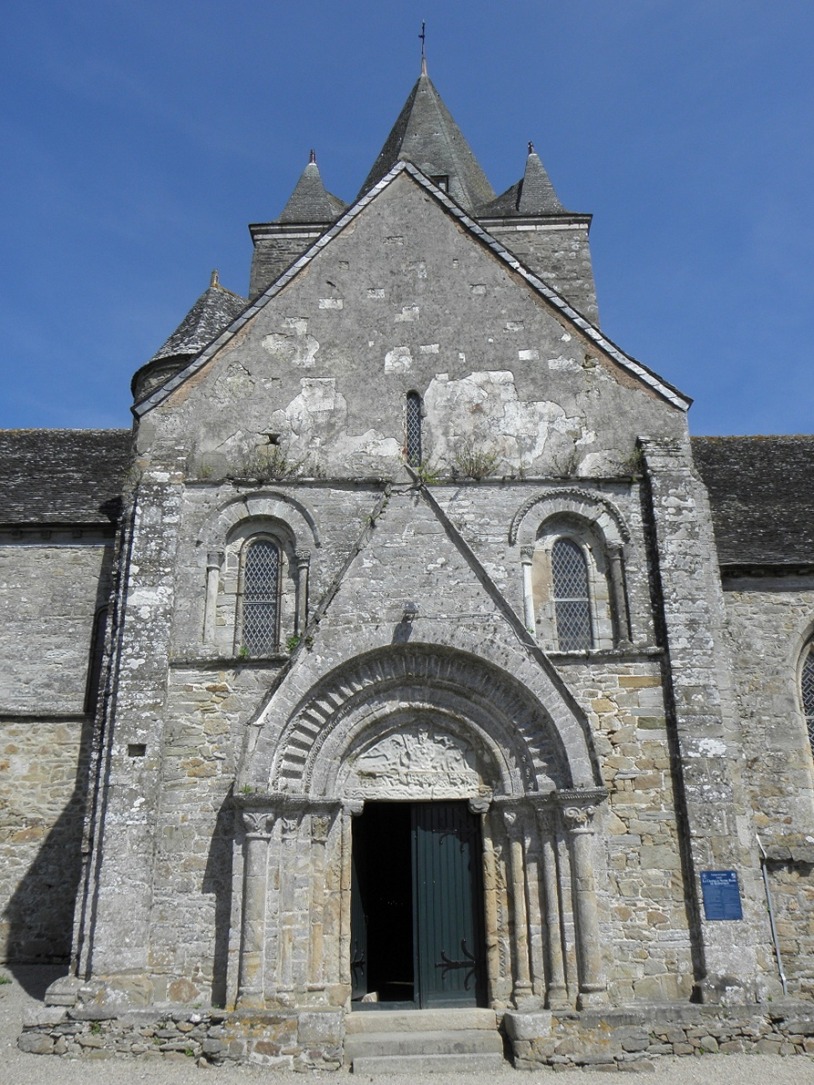 Façade méridionale du transept sud de la chapelle ND de Kernitron en Lanmeur (29).